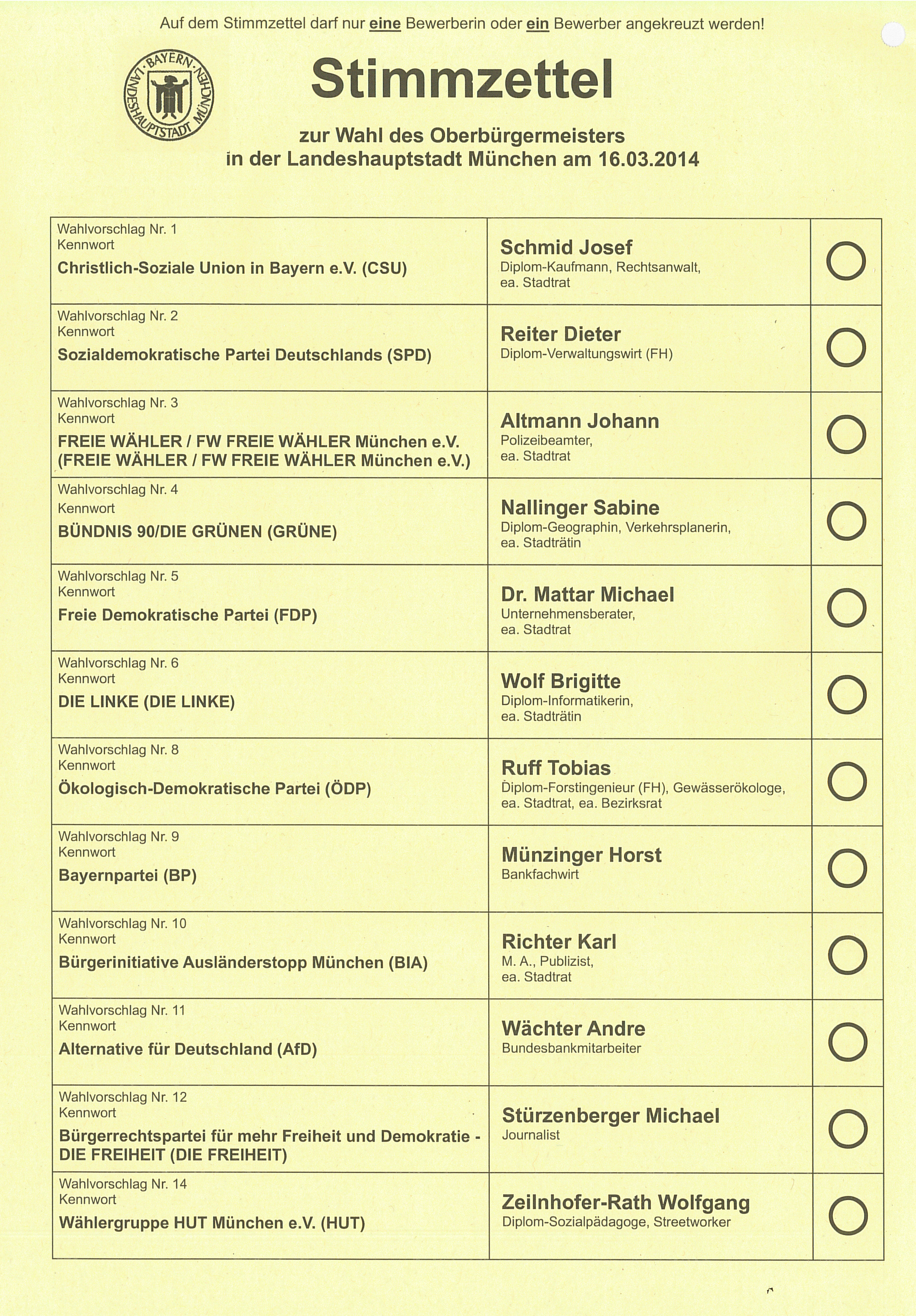 Stimmzettel zur Oberbürgermeisterwahl in München, Bayern, am 16. März 2014